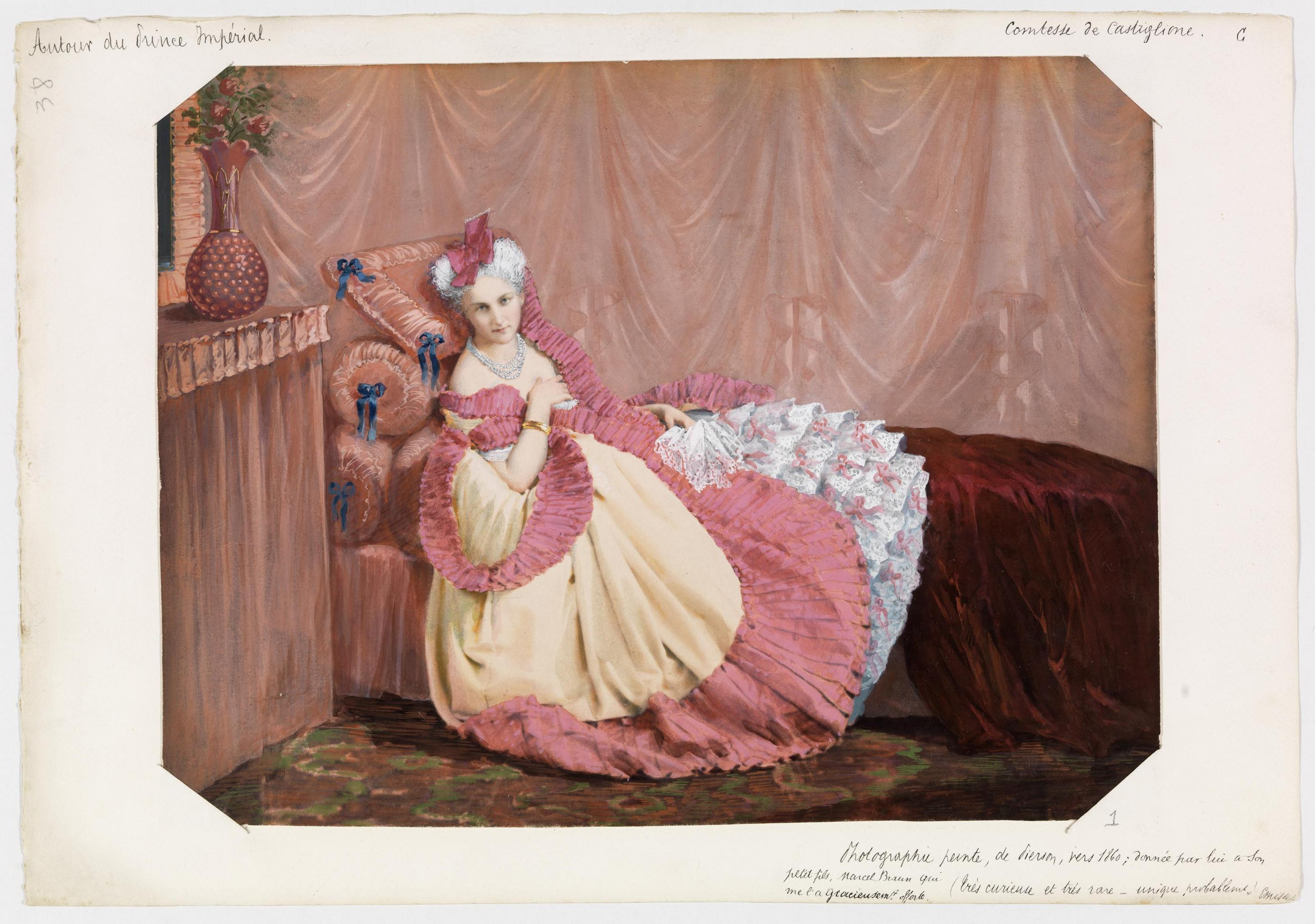 Portrait de la comtesse de Castiglione. Collection de l'abbé Misset.